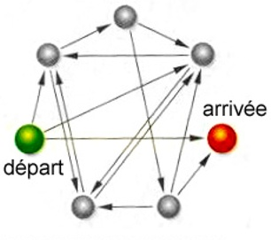 énoncé du problème du voyageur de commerce - le chemin hamiltonien